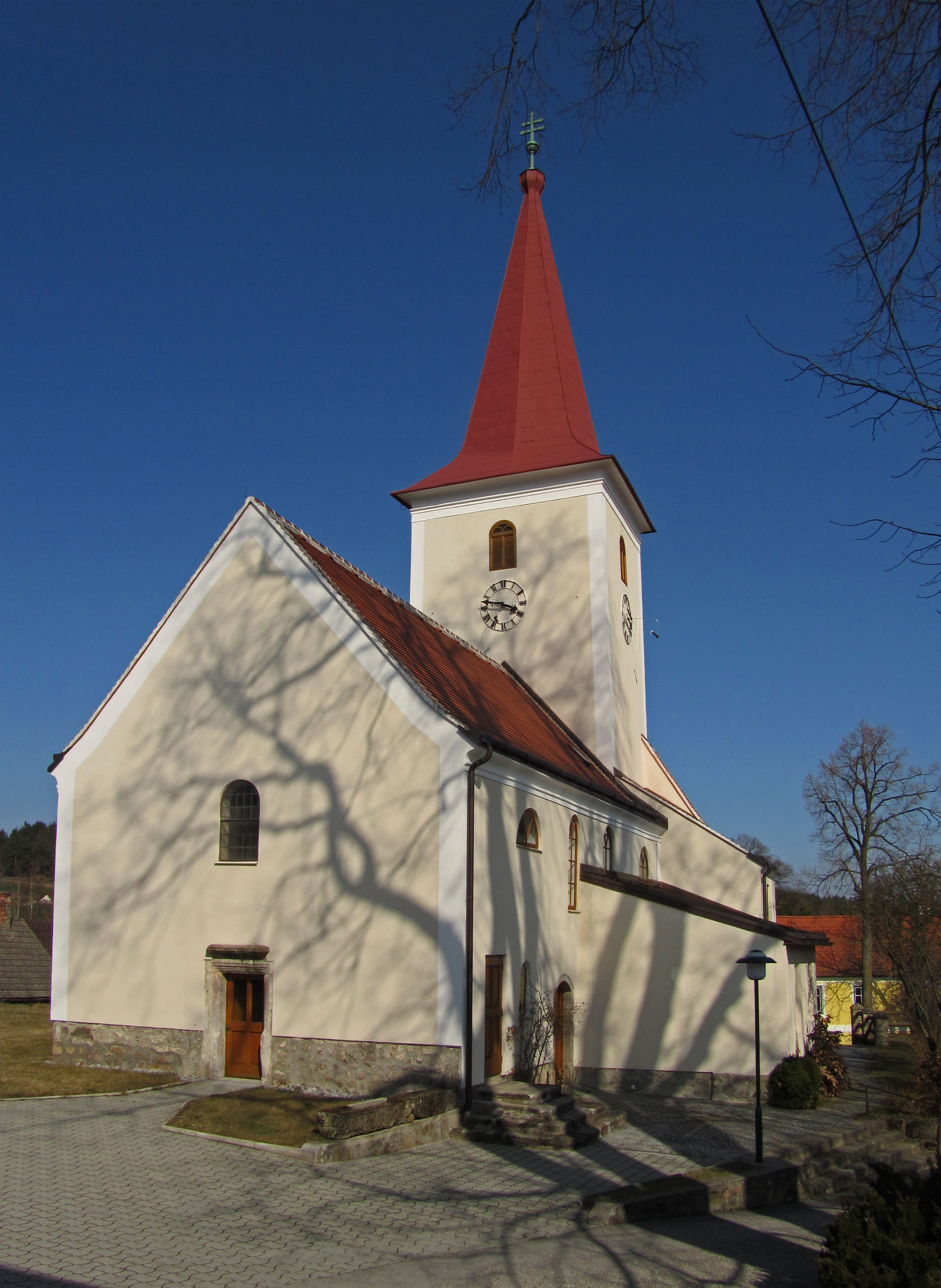 Kath. Pfarrkirche hl. Stephan in Rieggers